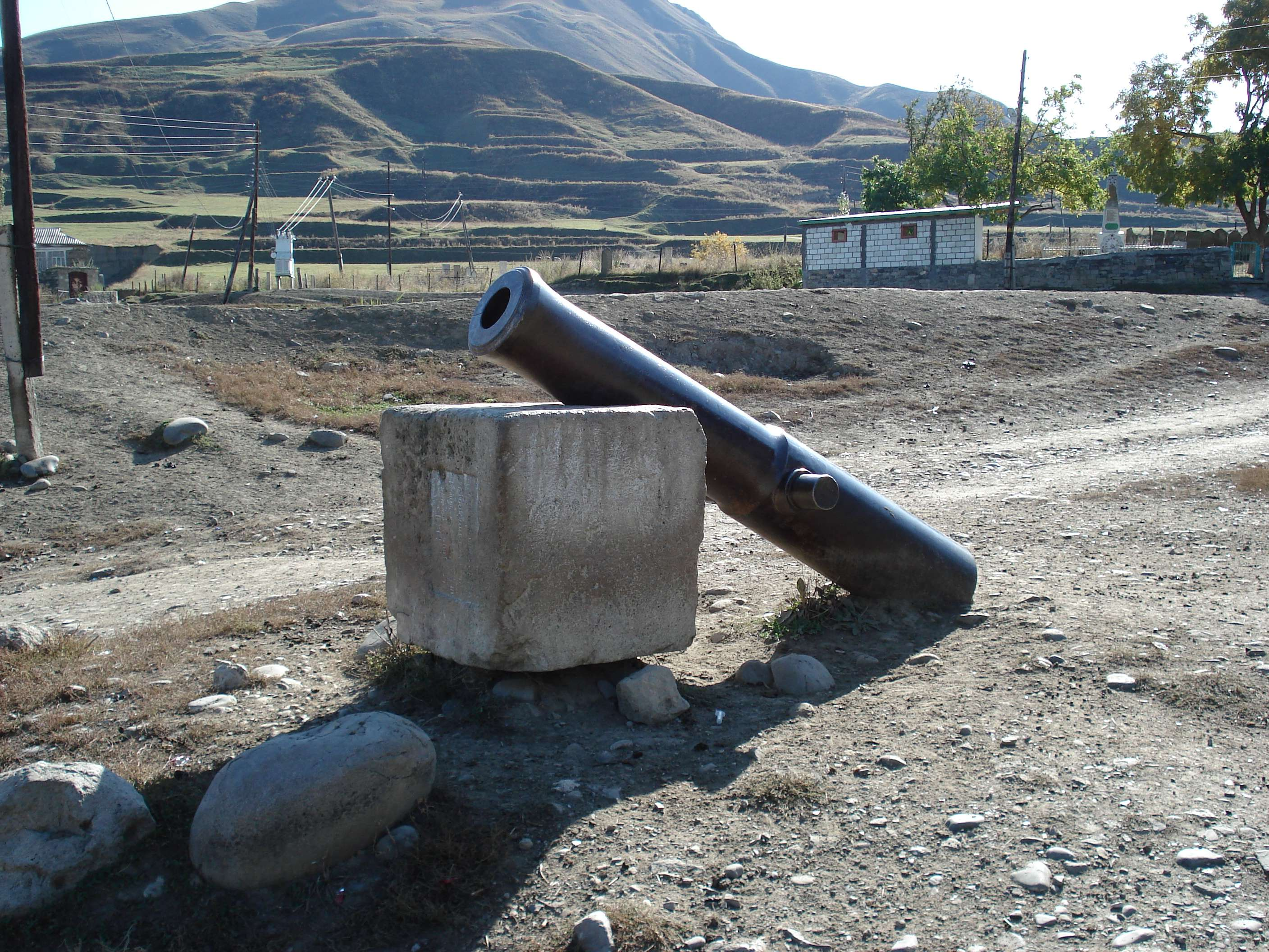 Лакский район, с. Хури